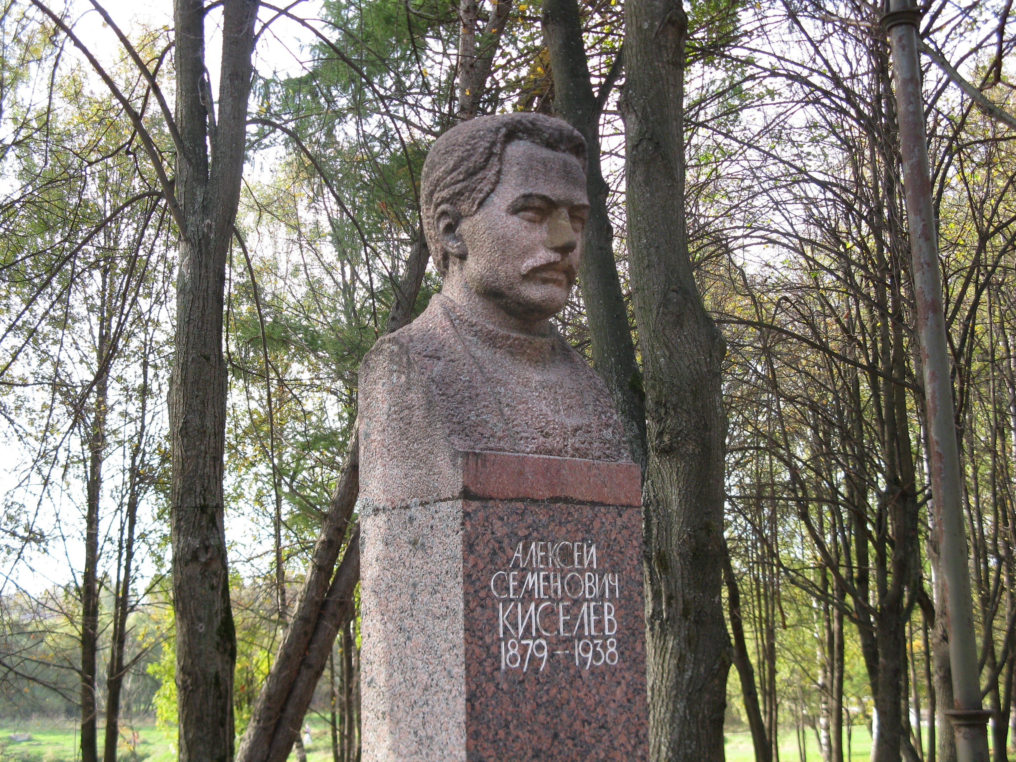 Бюст российского революционера Алексея Киселёва в парке 1905 года (Иваново).